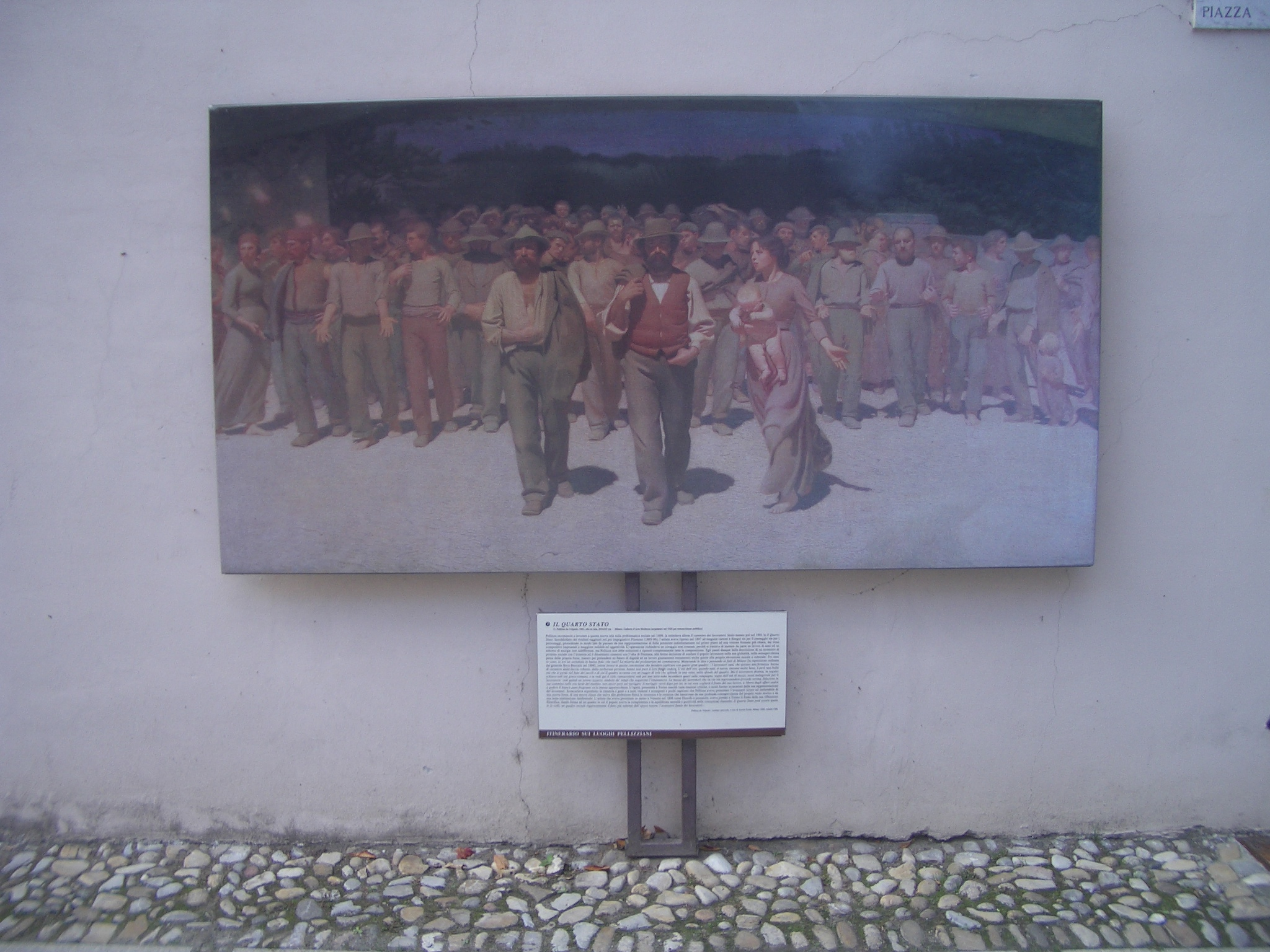 Copy of a Pelizza da Volpedo’s famous painting (titled Quarto Stato) in a square, Volpedo, Alessandria, Italy